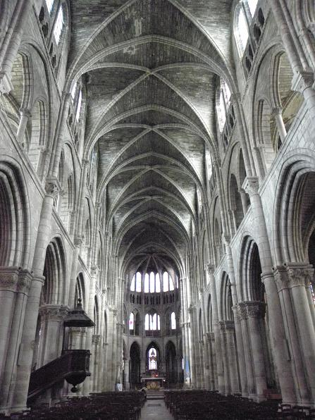 Vue intérieure de la collégiale Notre-Dame-en-Vaux de Châlons-en-Champagne (51).